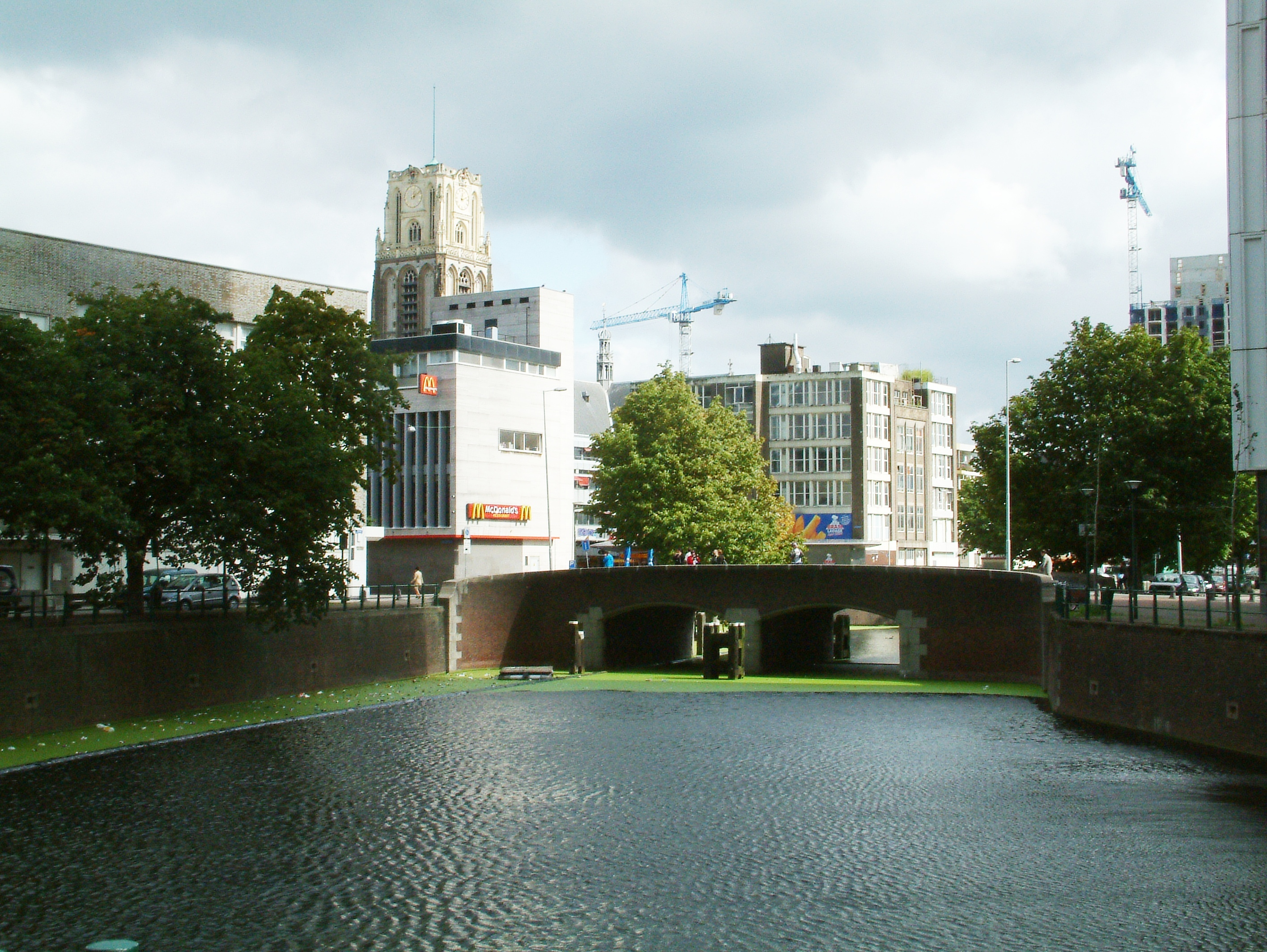 Bruggen over de Rotte, De Wezenbrug, westkant